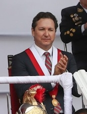 Daniel Salaverry (n. 1972) político peruano, congresista nacional desde 2016. Es el actual Presidente del Congreso de la República del Perú desde julio de 2018.